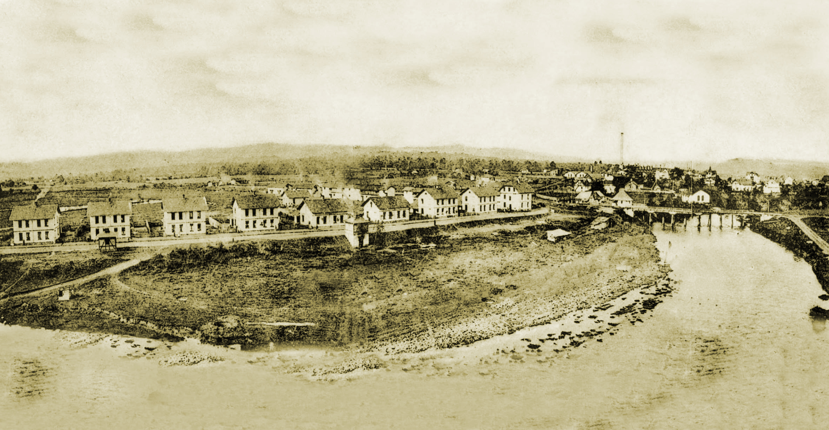 Град Теслић у настанку